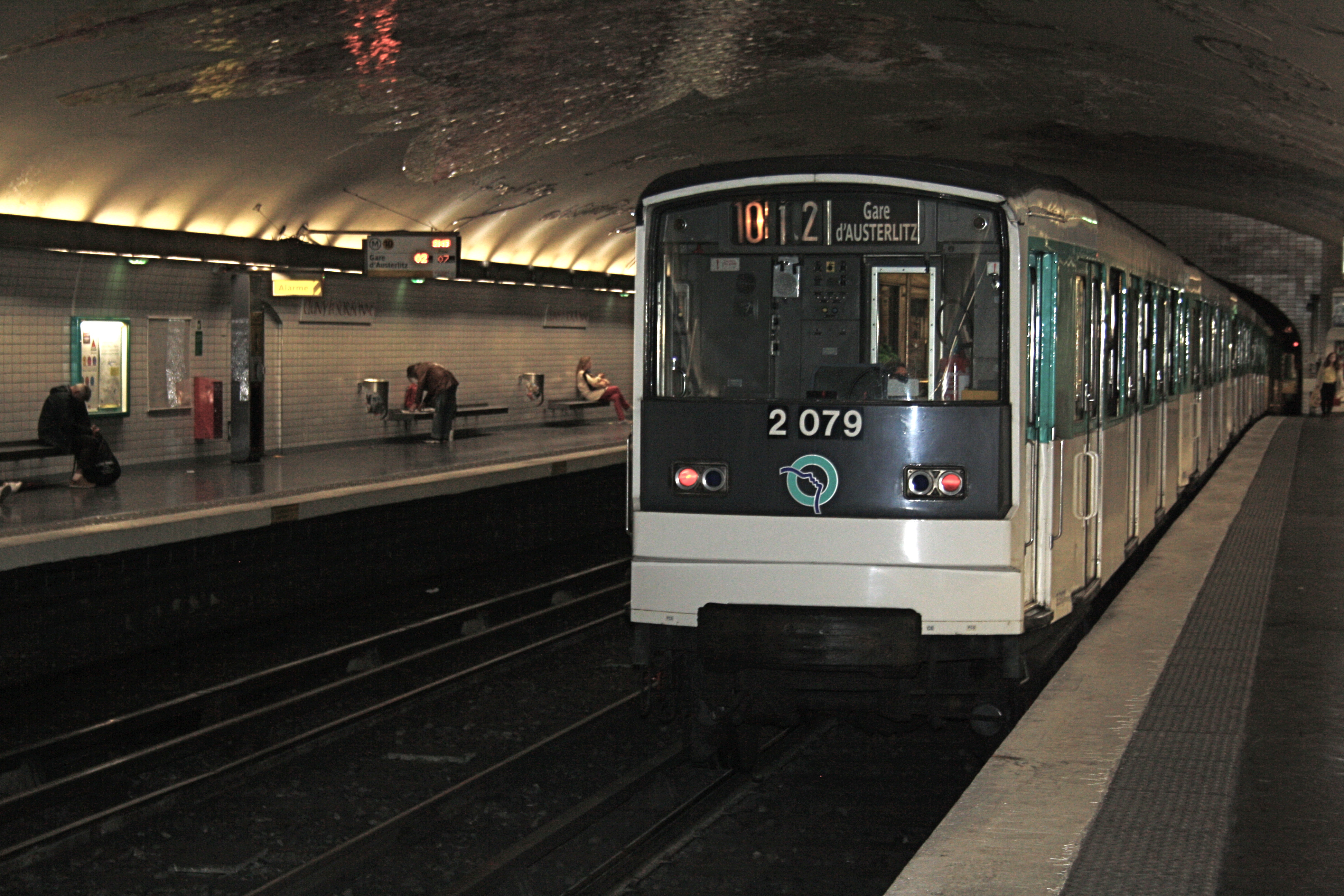 MF 67 in der Pariser Métrostation Cluny – La Sorbonne